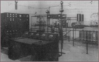 Equipo transmisor de LR5 Radio Splendid, en la planta transmisora de Transradio Internacional en Monte Grande.